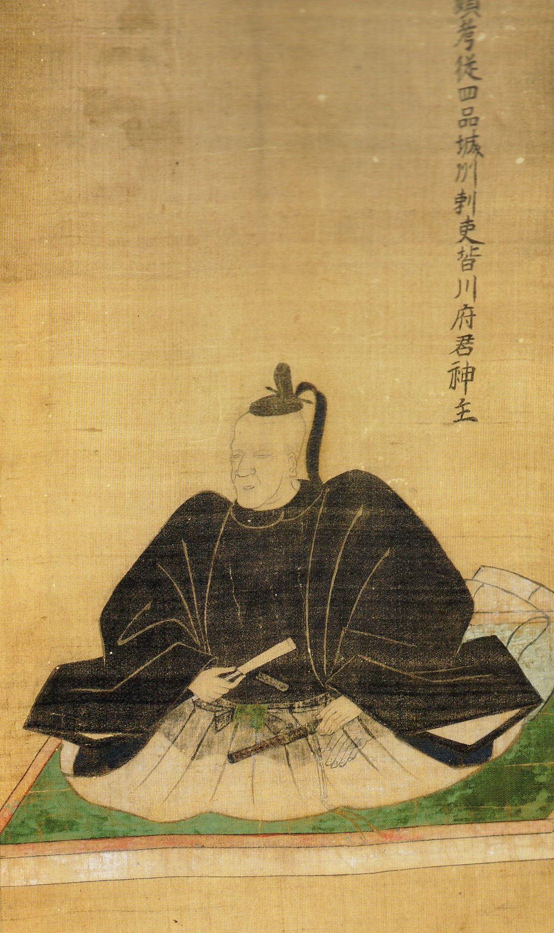 皆川広照の肖像。